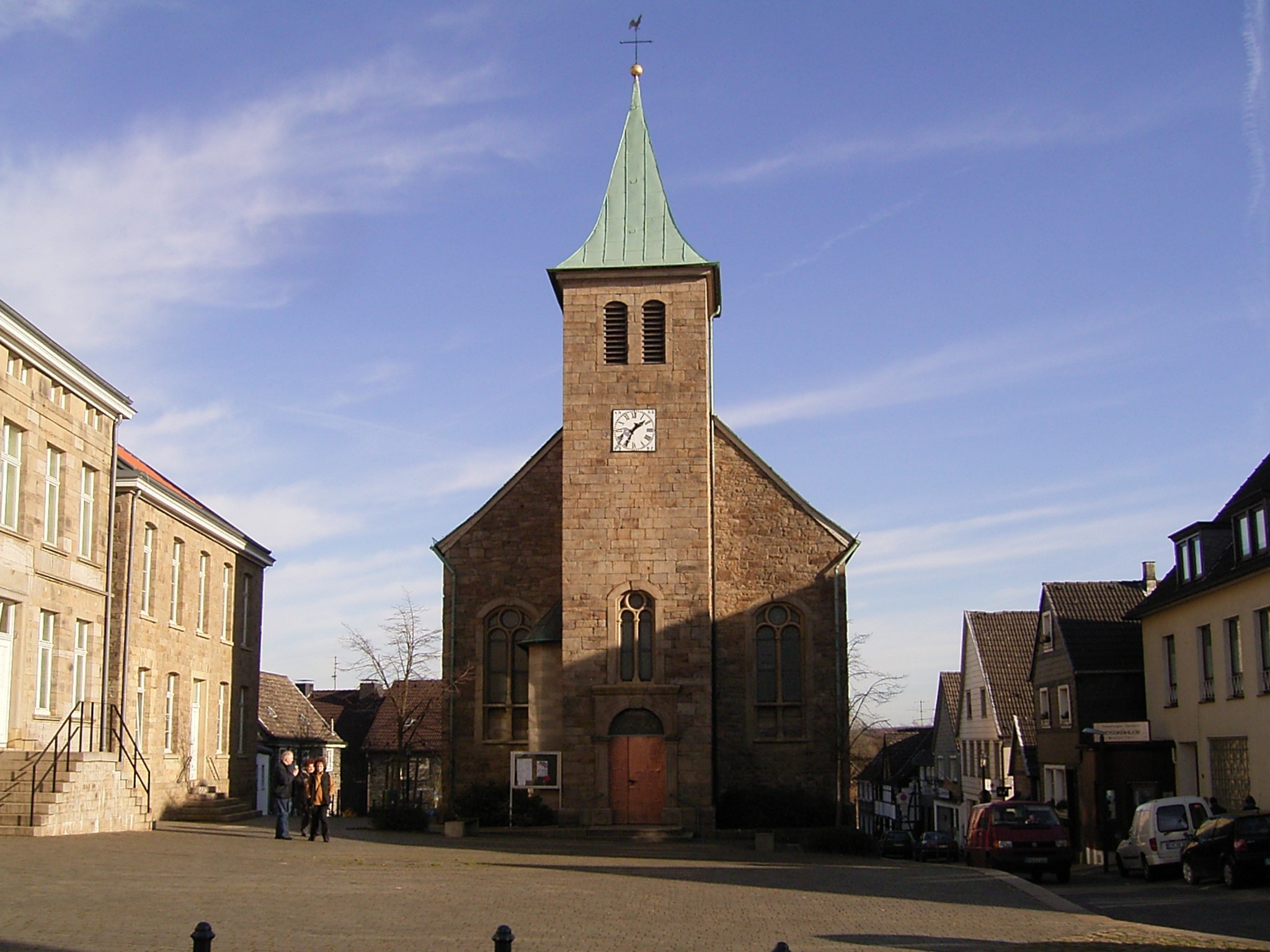 Katholische Kirche St. Johannes Baptist auf dem Marktplatz in Hattingen - Blankenstein